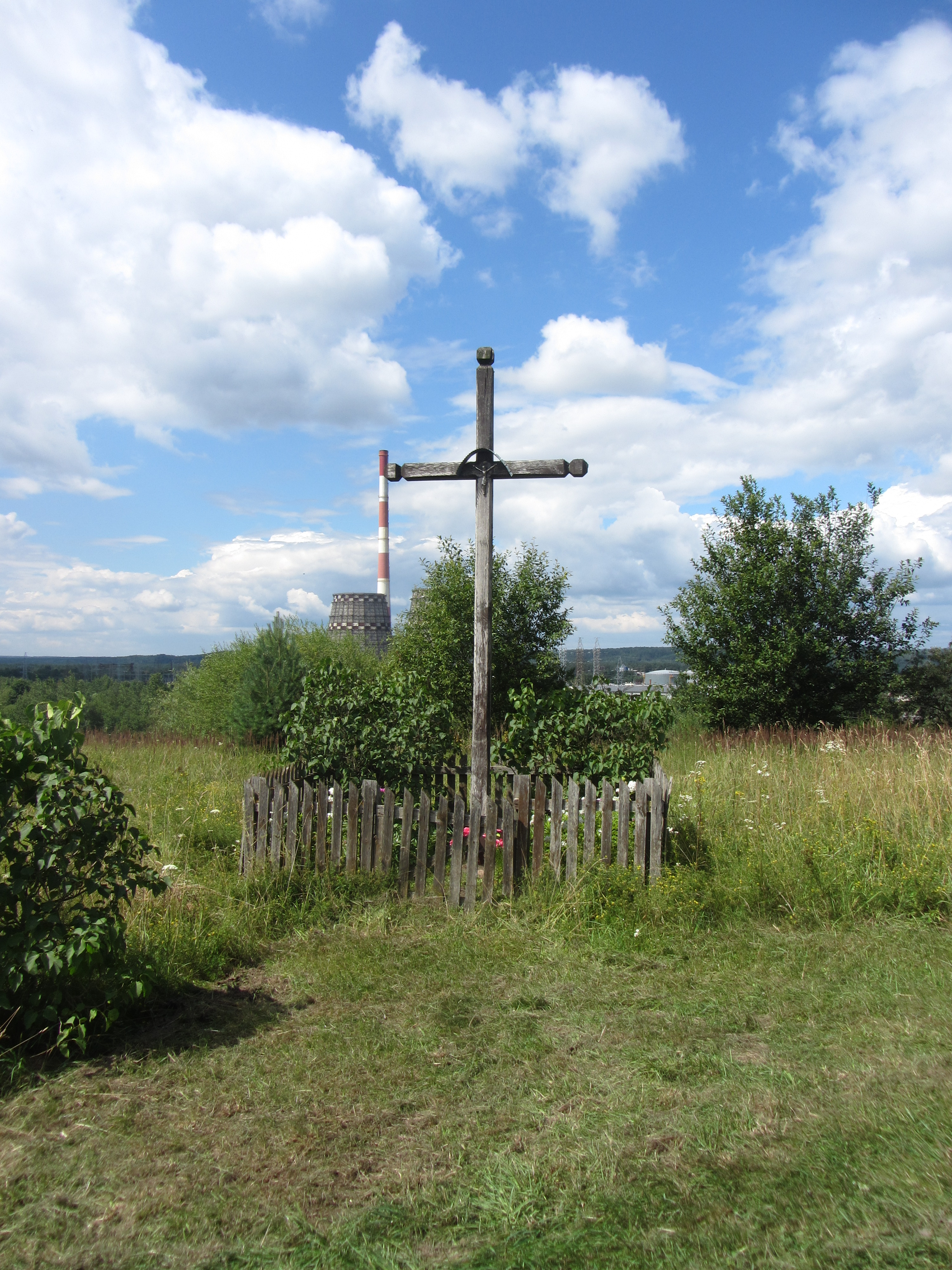 Paneriai, Vilnius, Lithuania